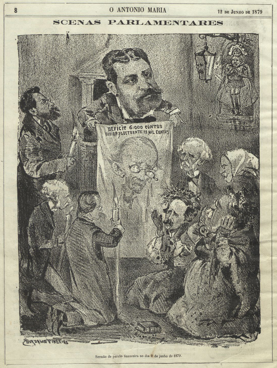 Caricatura da autoria de Rafael Bordalo Pinheiro - Cenas Parçamentares - O Ministro da Fazenda, Henrique de Barros Gomes mostra o deficit publico herdado do seu antecessor Serpa Pimentel.